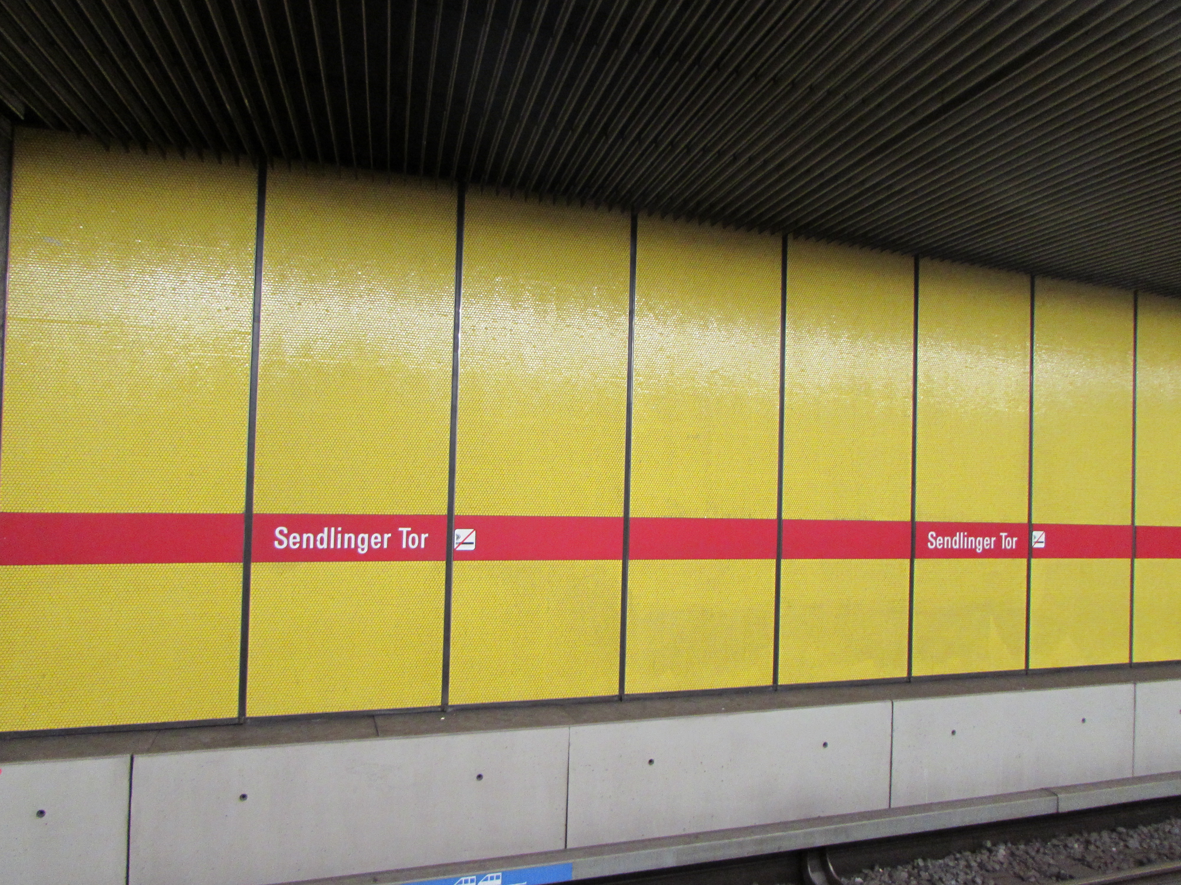 Sendlinger Tor stazione Metropolitana